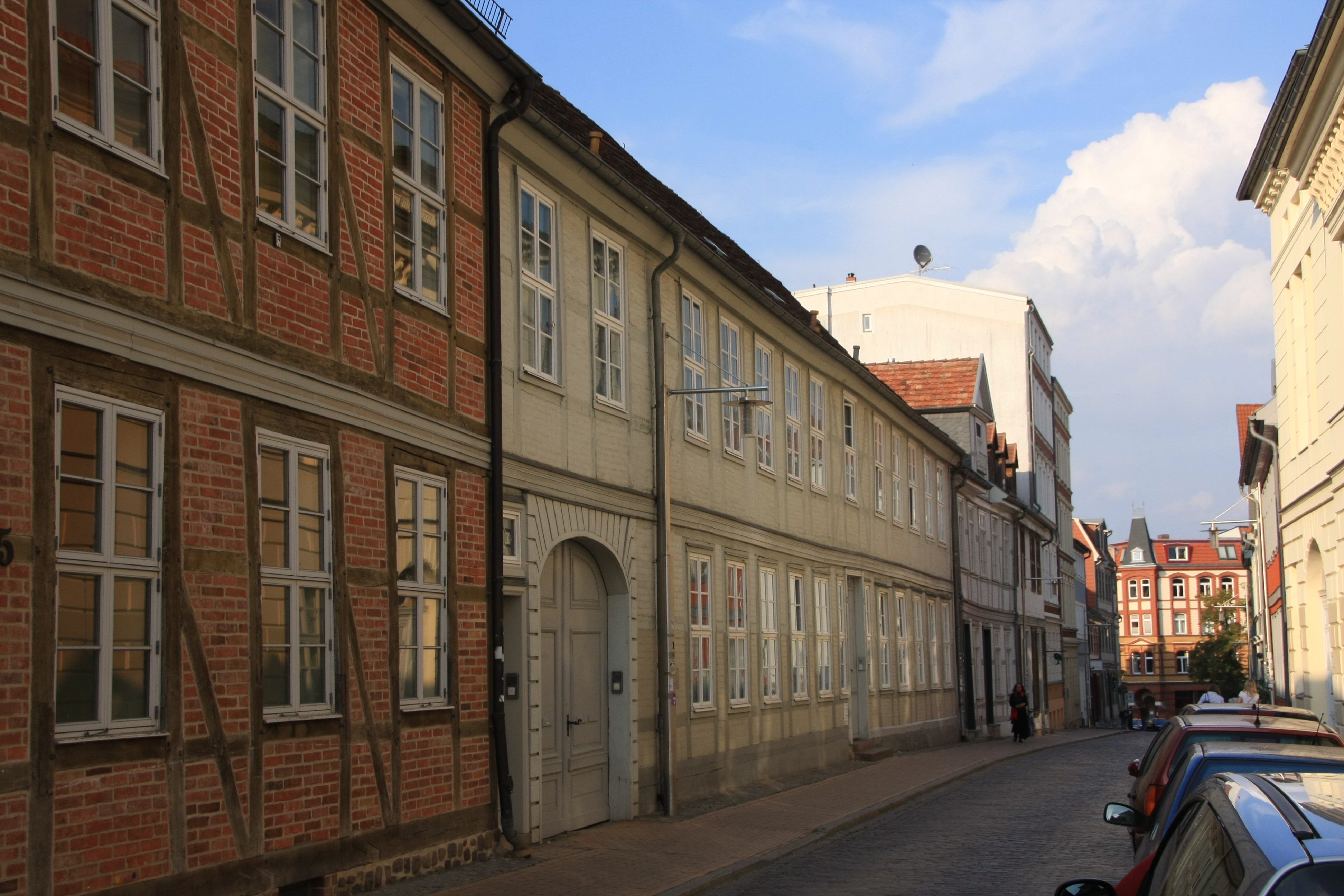 19055 Schwerin, Münzstraße 13